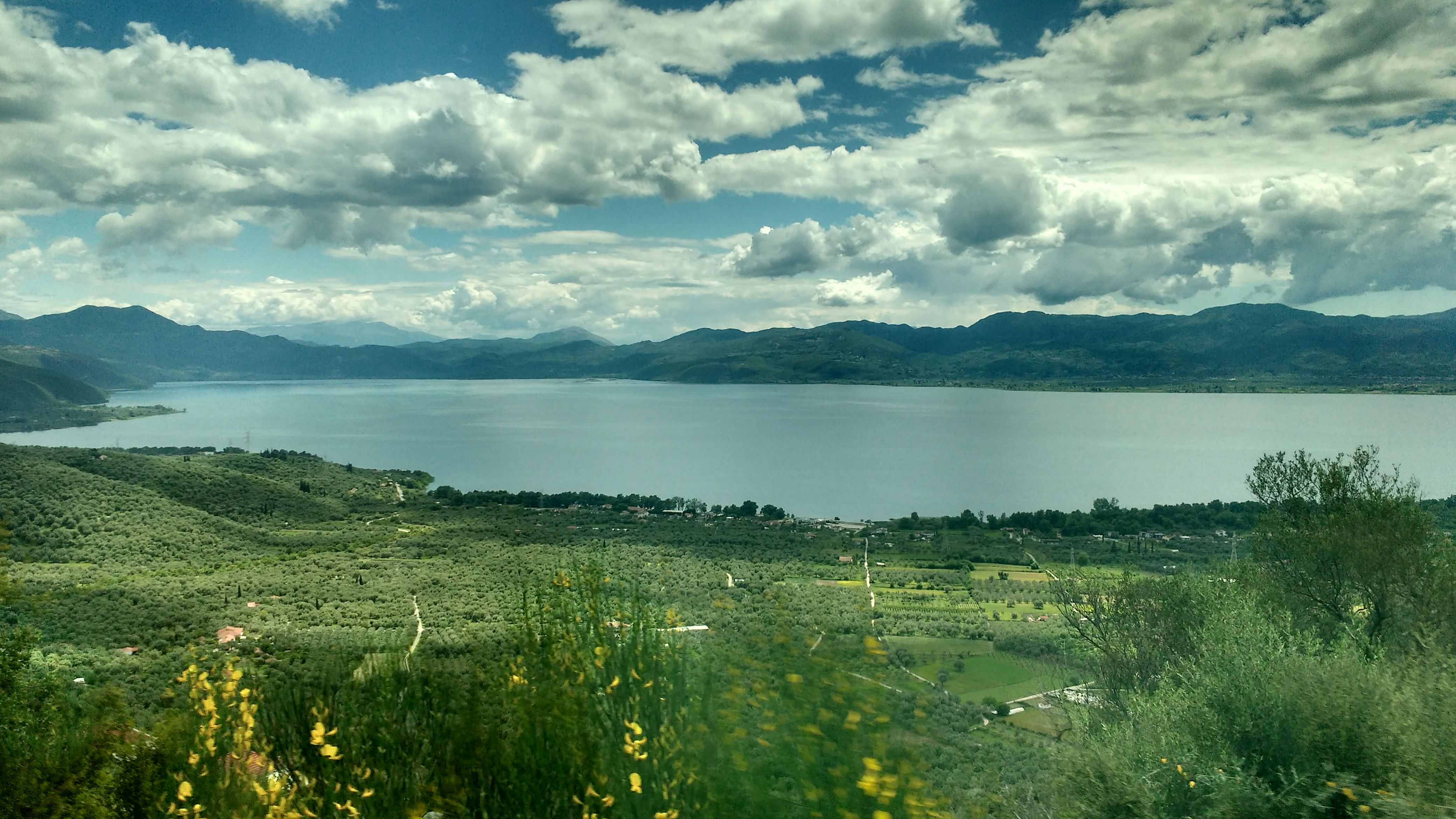 Άποψη της Λίμνης Τριχωνίδας (Δυτικό άκρο), φαίνονται ακόμη (τμηματικά) τα χωριά Ντουγρή και Παντάνασσα This is a photography of Natura 2000 protected area with ID GR2310009